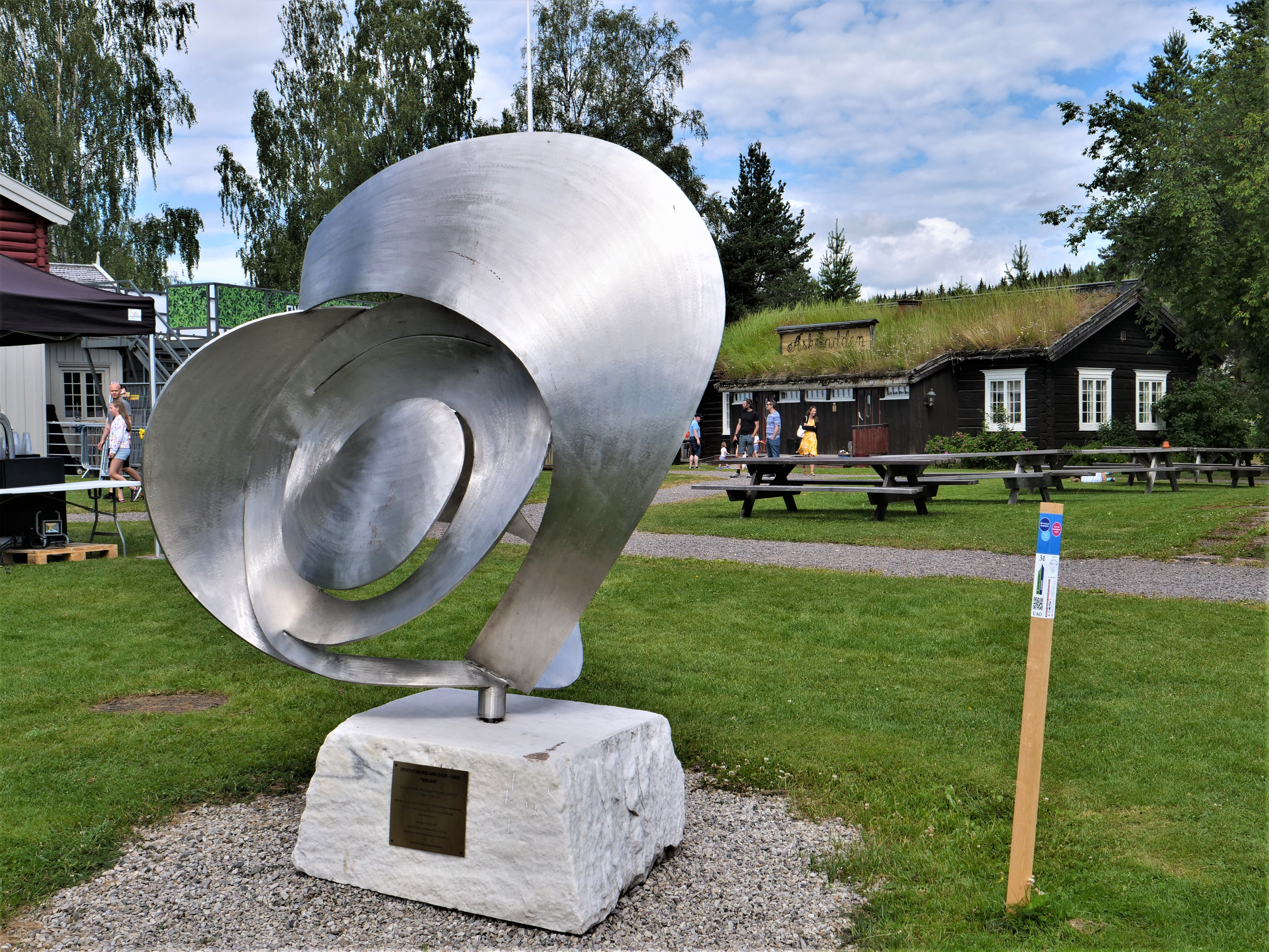 Arnold Haukeland 1920 bis 1983 in Koppang - Die Welle